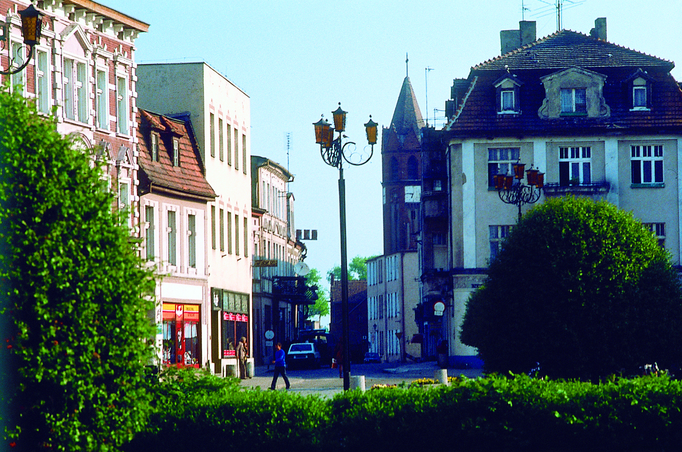 Żnin, wylot z rynku do ulicy Śniadeckich